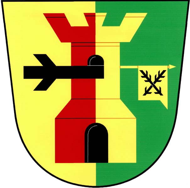 Znak obce Vrchovany